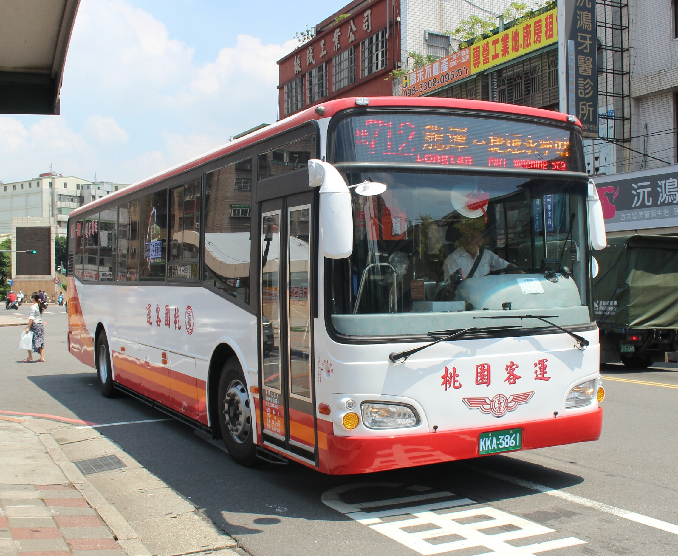 中文（台灣）: 桃園客運2018年日野RK8JRVA-KJF大客車KKA-3861，行駛桃園市公車712線。拍攝地點：新北市土城區承天路。